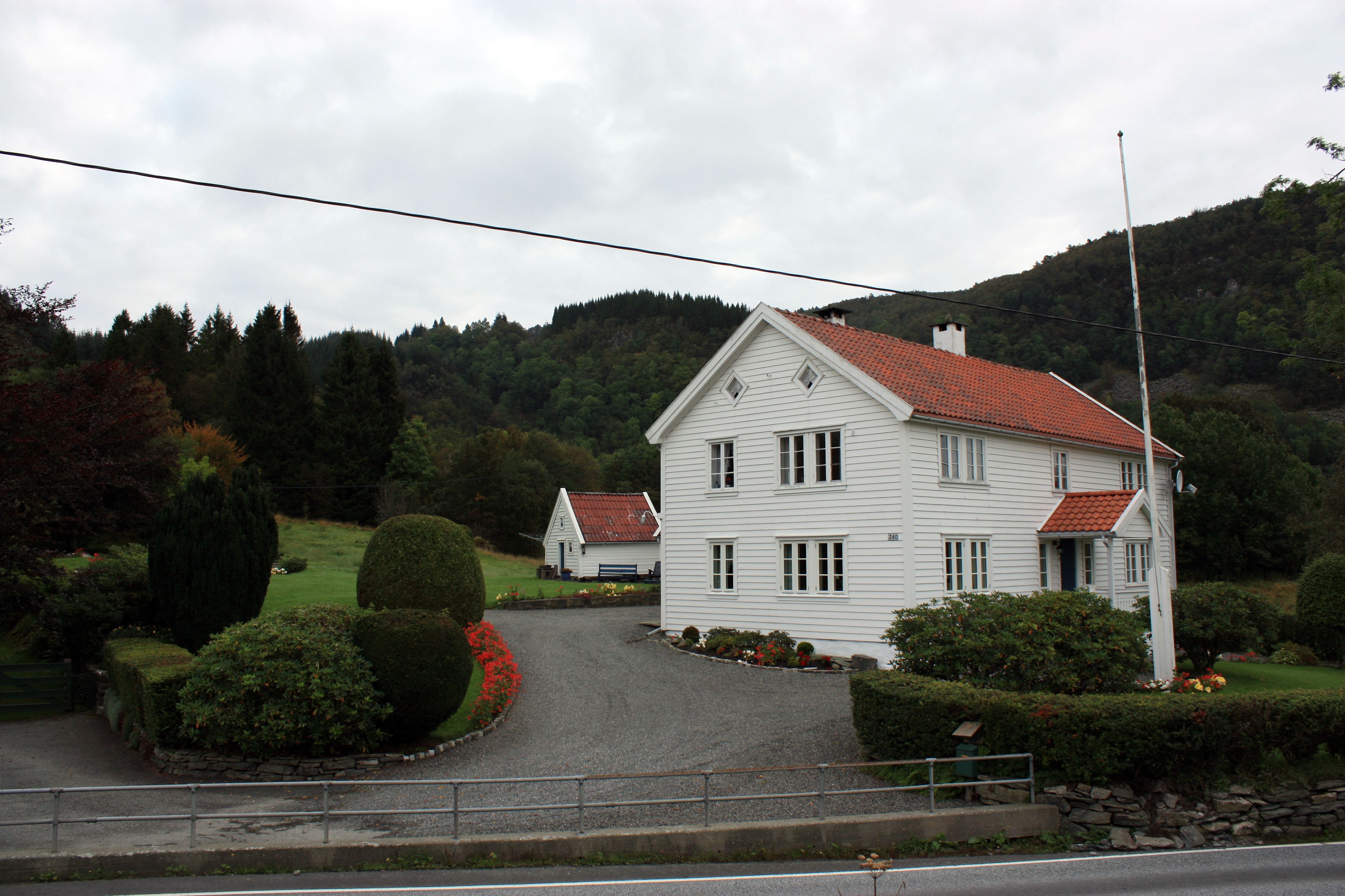 Øvre Sandven, Fana, Bergen.